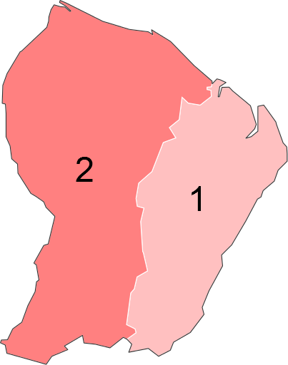 Résultats des élections législatives de Guyane en 2012